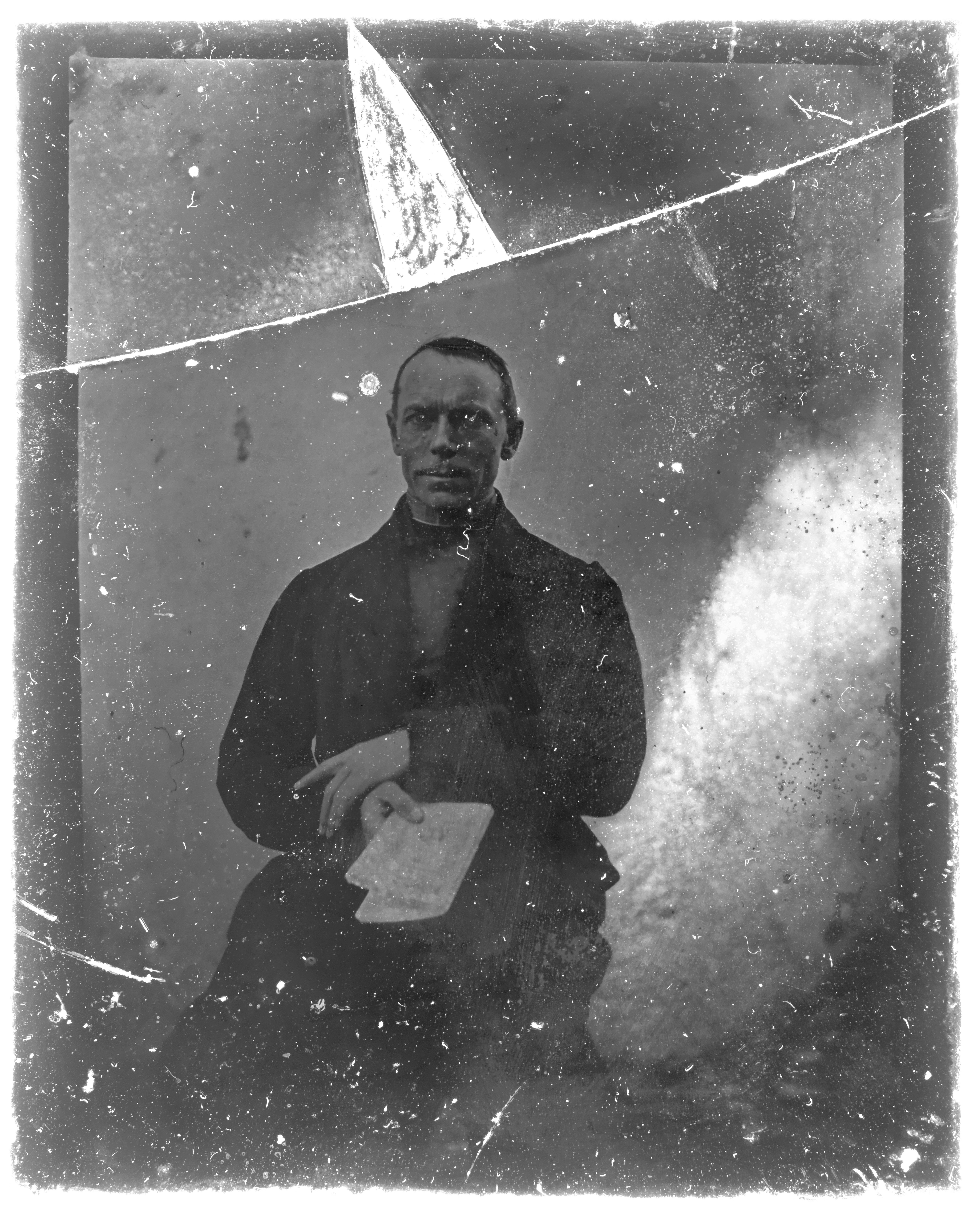 Avtoportret (original)